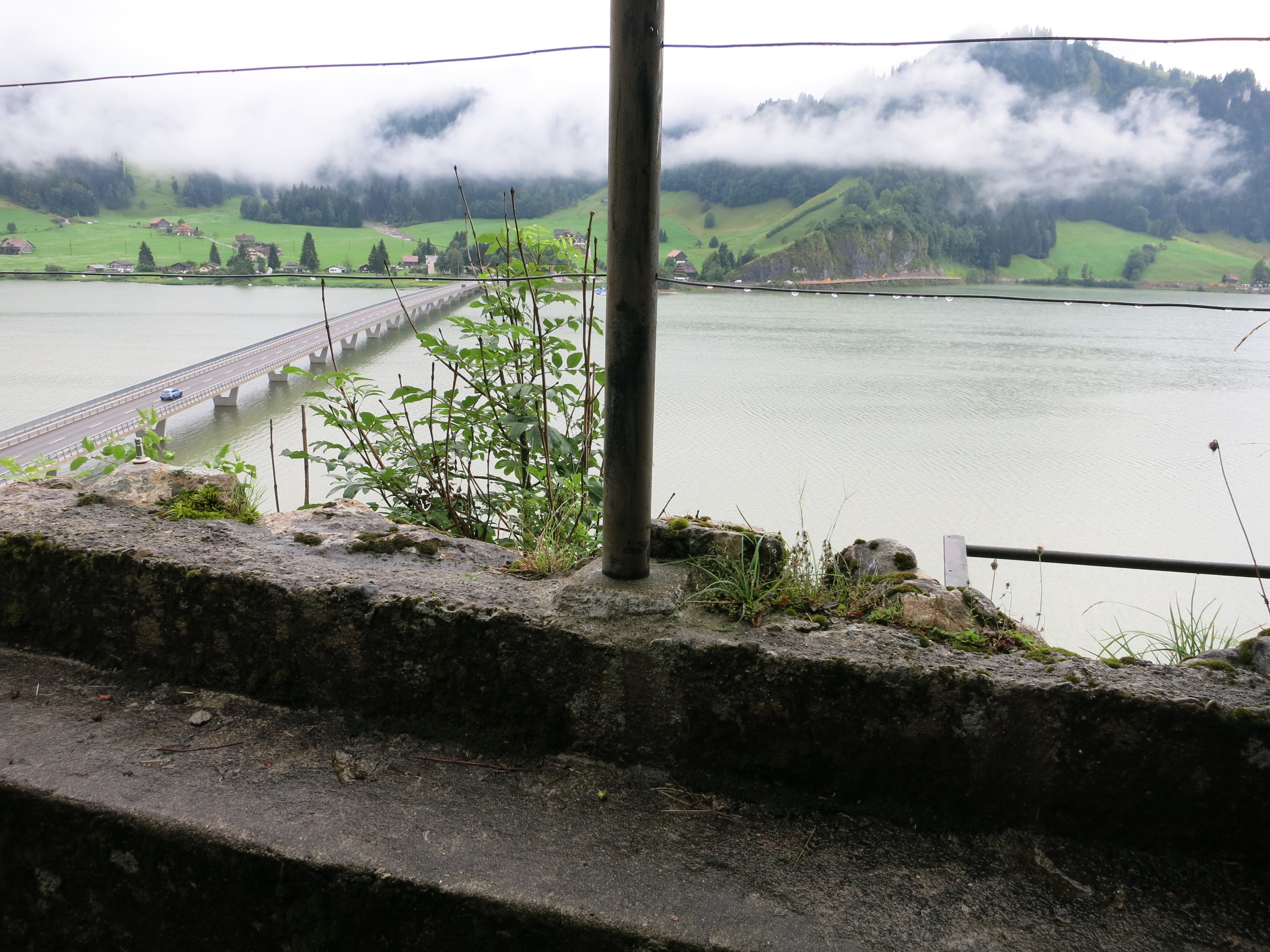 Sperrstelle 2430 Ruestel/Steinbach, Euthal SZ, Schweiz